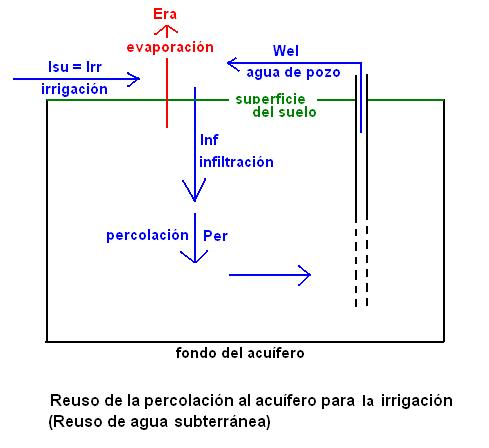 Diagrama de reuso de agua subterránea para el riego ustilizando pozos bomdeados